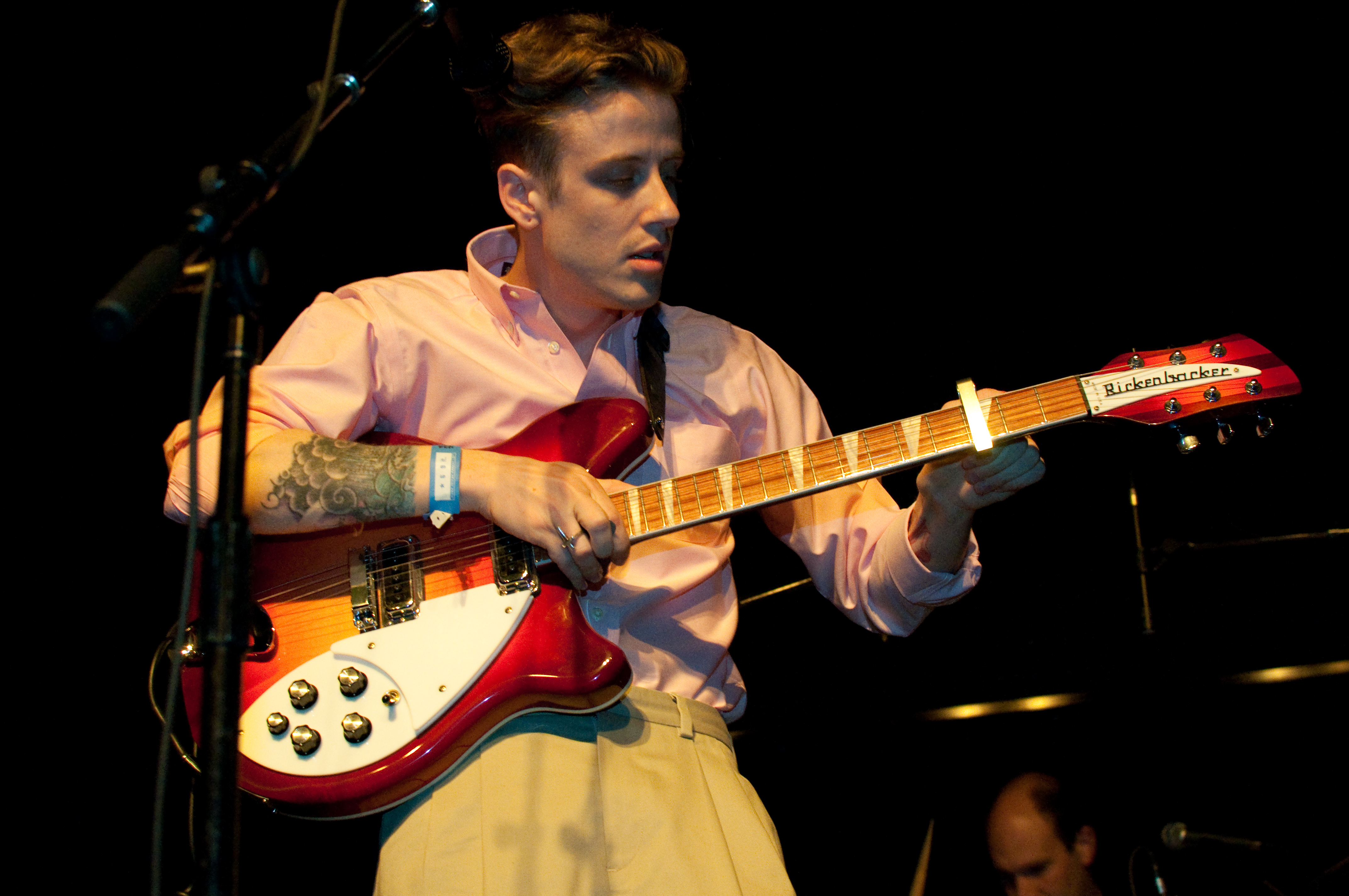 Christopher Owens, sångare i Girls, under en konsert i Vancouver 2010.